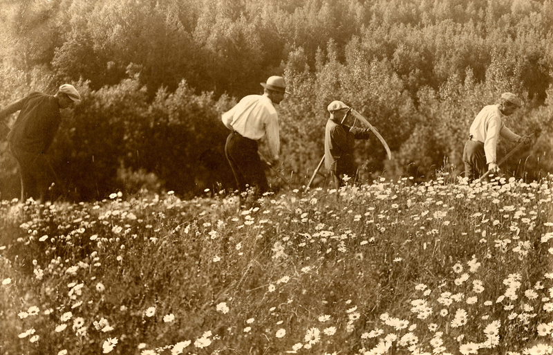 Šienpjoviai. Balbieriškio apylinkės, XX a. 3 d-metis